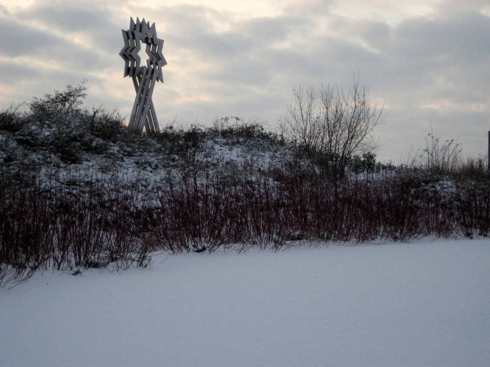 Triple Star Head sculpture by Romanian artist Paul Neagu in Furzton